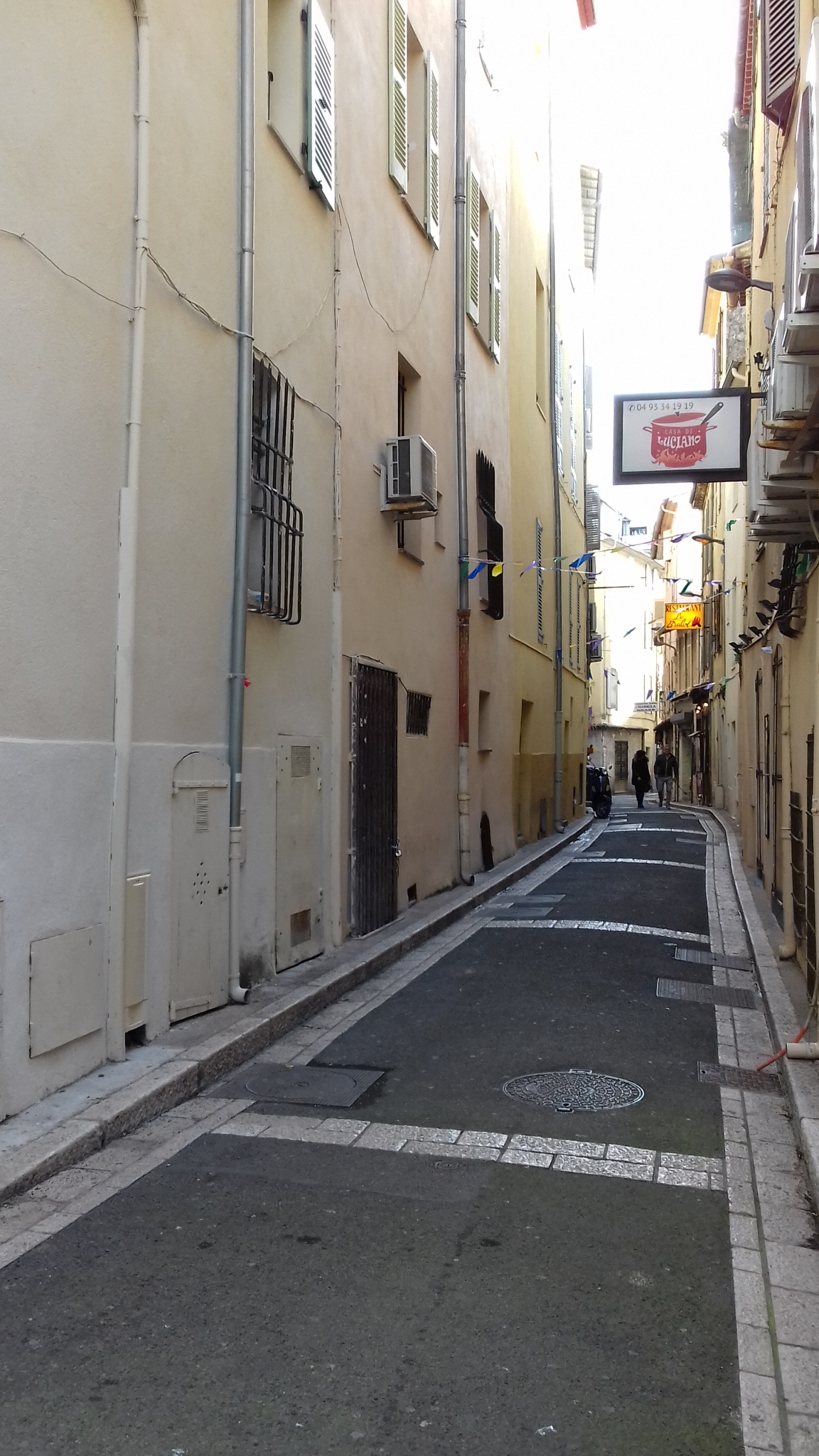 dans les rues d'Antibes